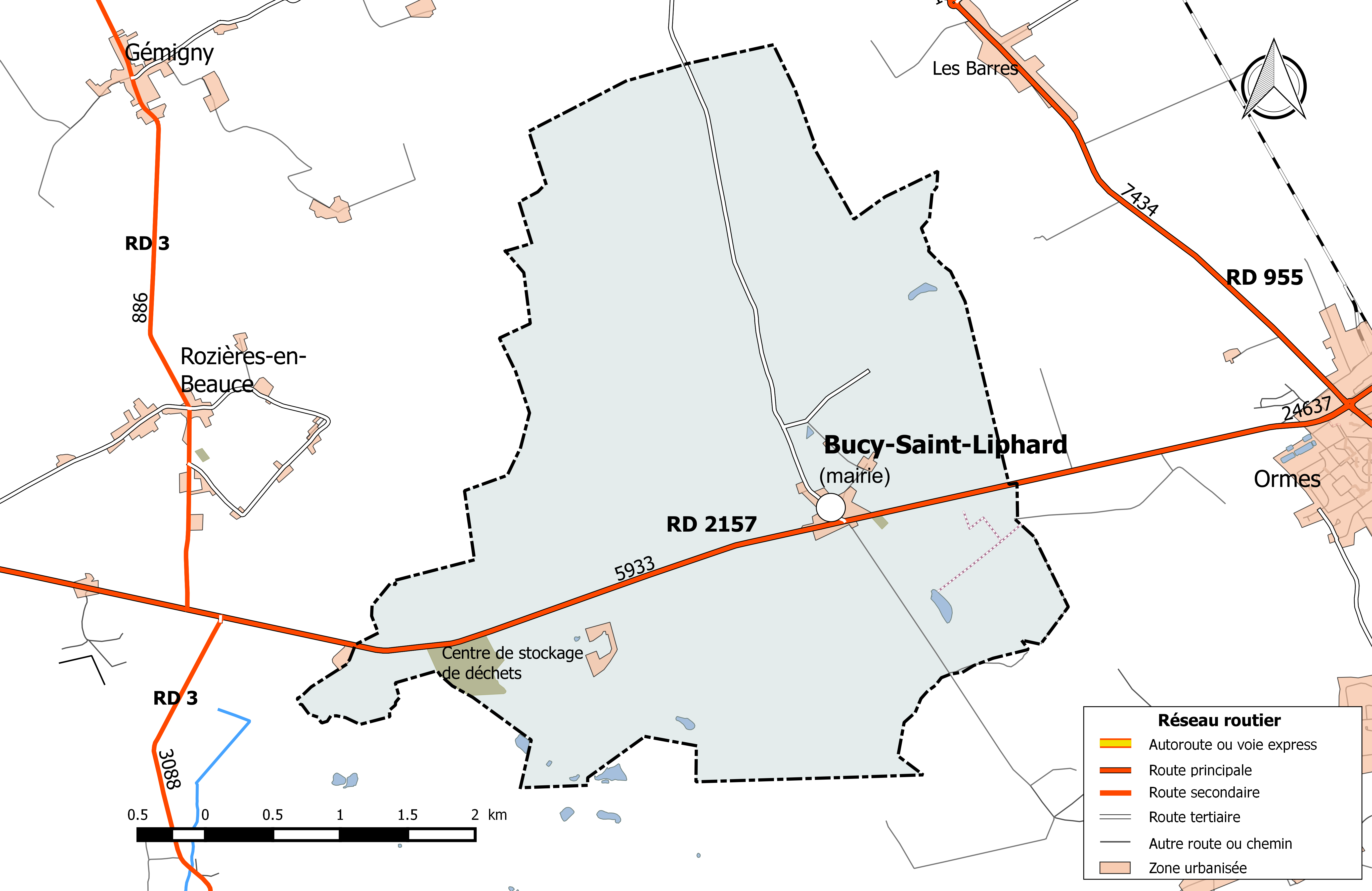 Carte du réseau routier de la commune de Bucy-Saint-Liphard.